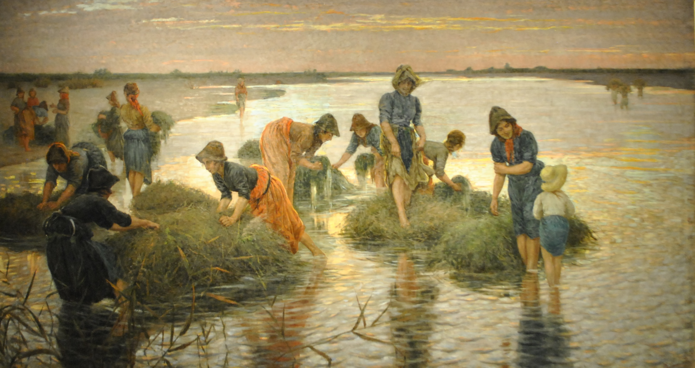 Niccolò Cannicci, Le gramignaie al fiume, 1896, olio su tela, cm 151 × 280, Firenze, Collezione Ente Cassa di Risparmio di Firenze